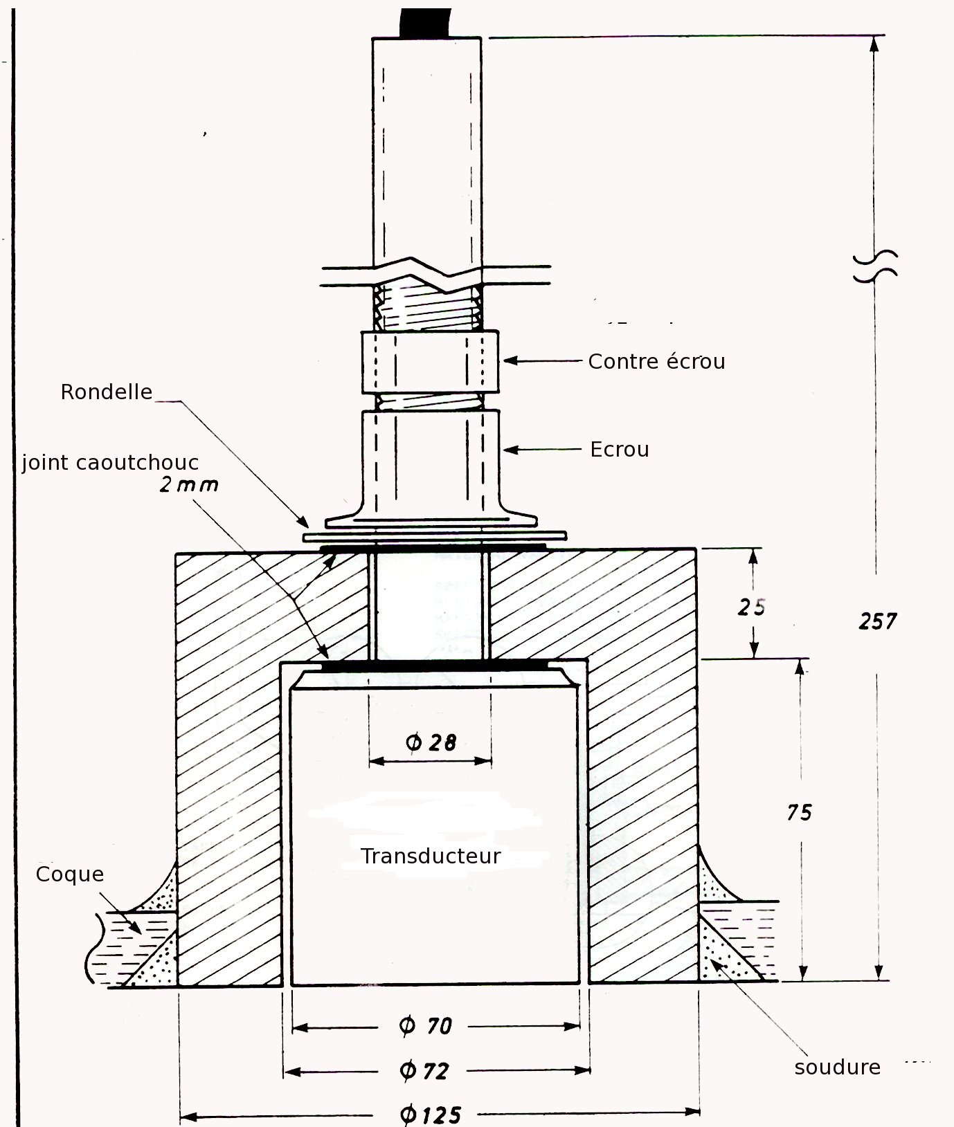 Transducteur de sondeur. Echo sounder transducer.